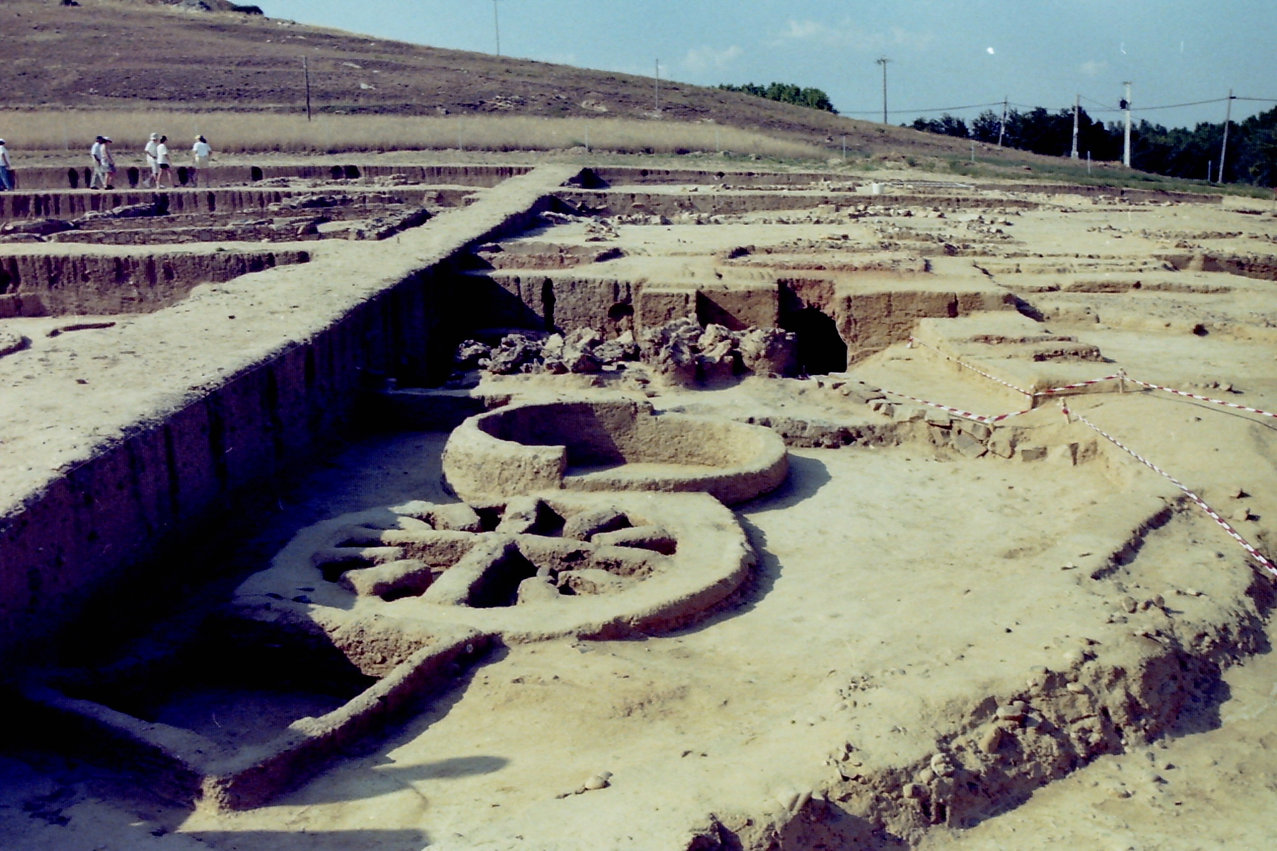 Manganeses de la Polvorosa. Yacimiento arqueológico de La Corona-El Pesadero. Agosto 1997